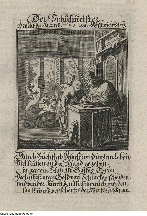 Original image description from the Deutsche Fotothek Ständebuch & Lehrstand & Beruf & Lehrer